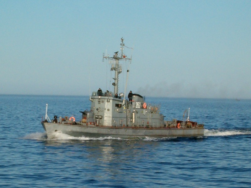 ORP "Wytrwały" na wodach Zatoki Gdańskiej